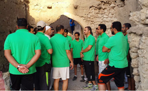 جولة رياضية استطلاعية لمعالم قلعة القطيف.